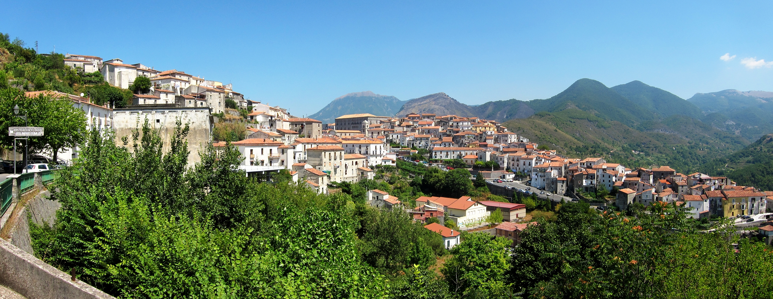 Vue d'Aieta (Calabre).